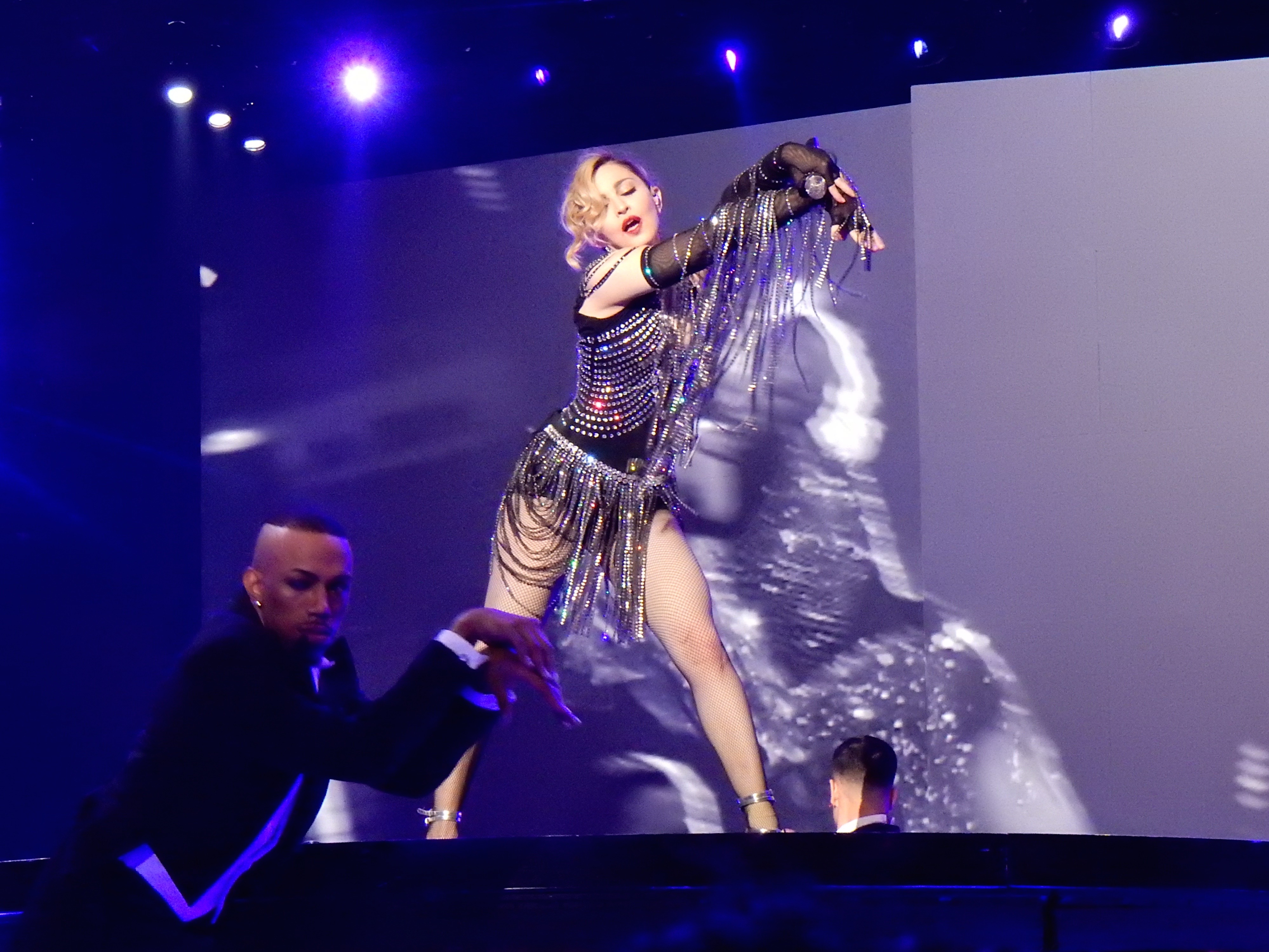 Madonna - Rebel Heart Tour Cologne 2